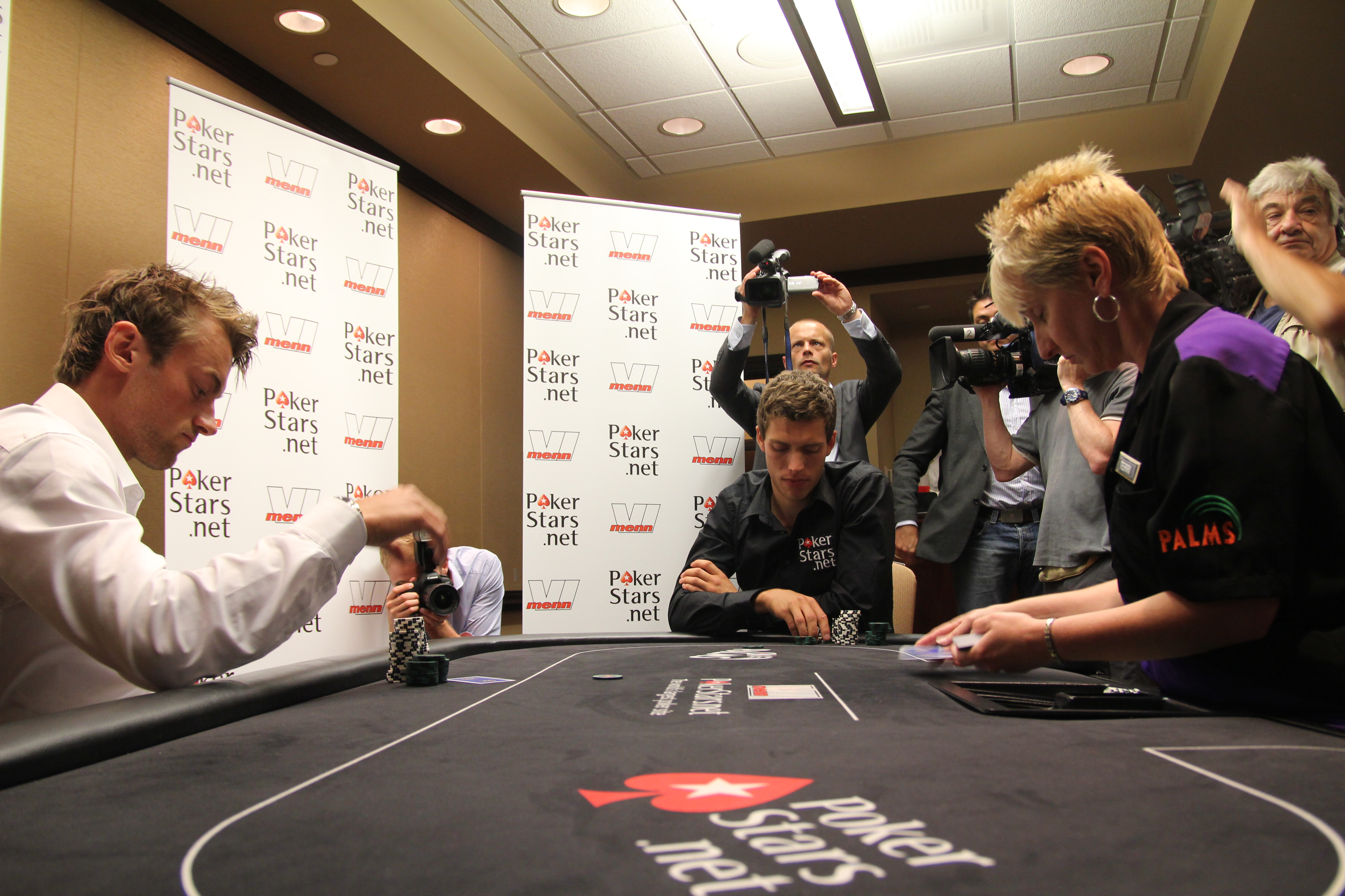 Marcus Hellner och Petter Northug i Las Vegas för en reklamkampanj för PokerStars.